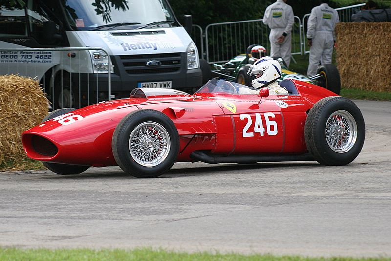 Ferrari Dino 246 F1